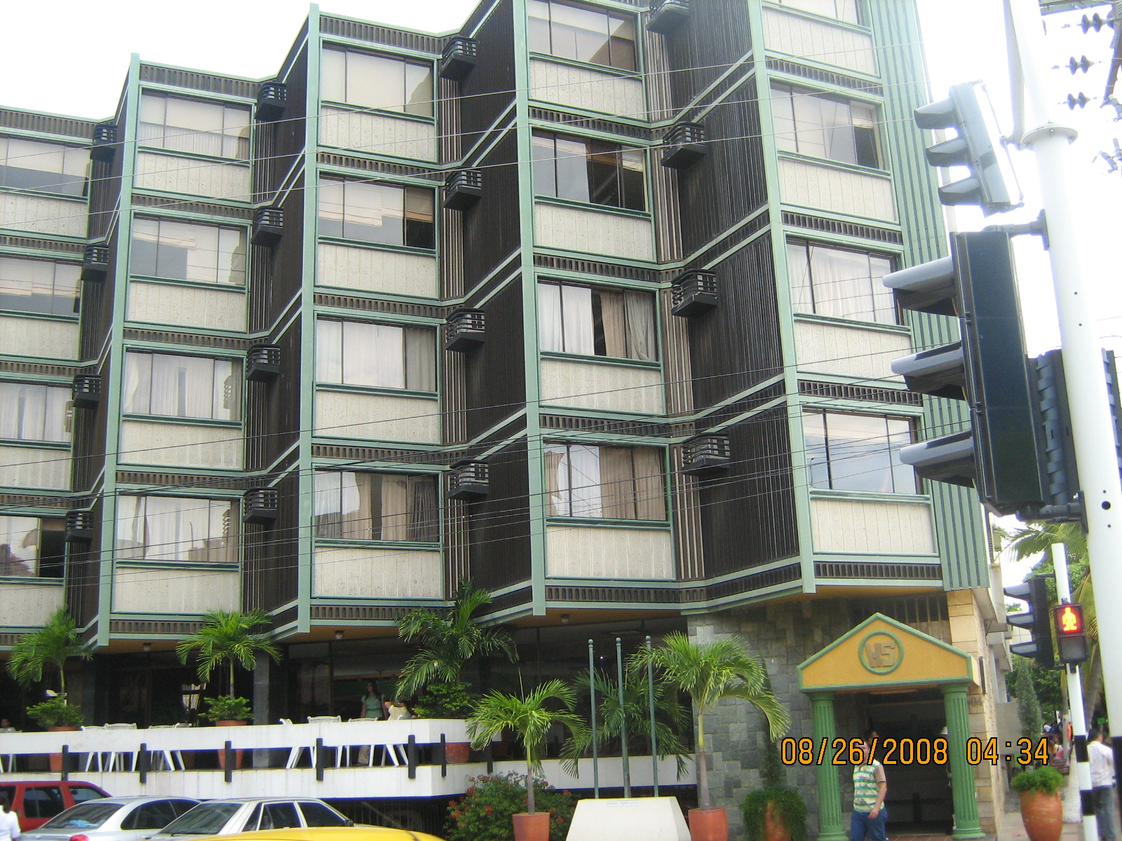 Hotel en el centro de Valledupar